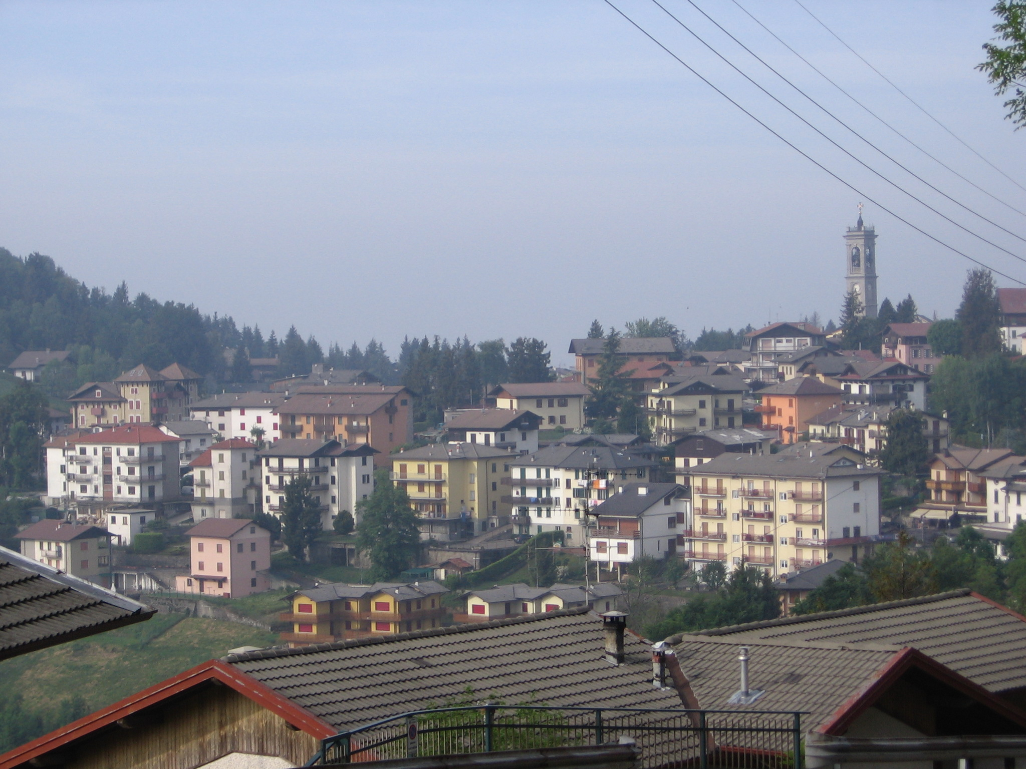 Selvino, Bergamo, Italia